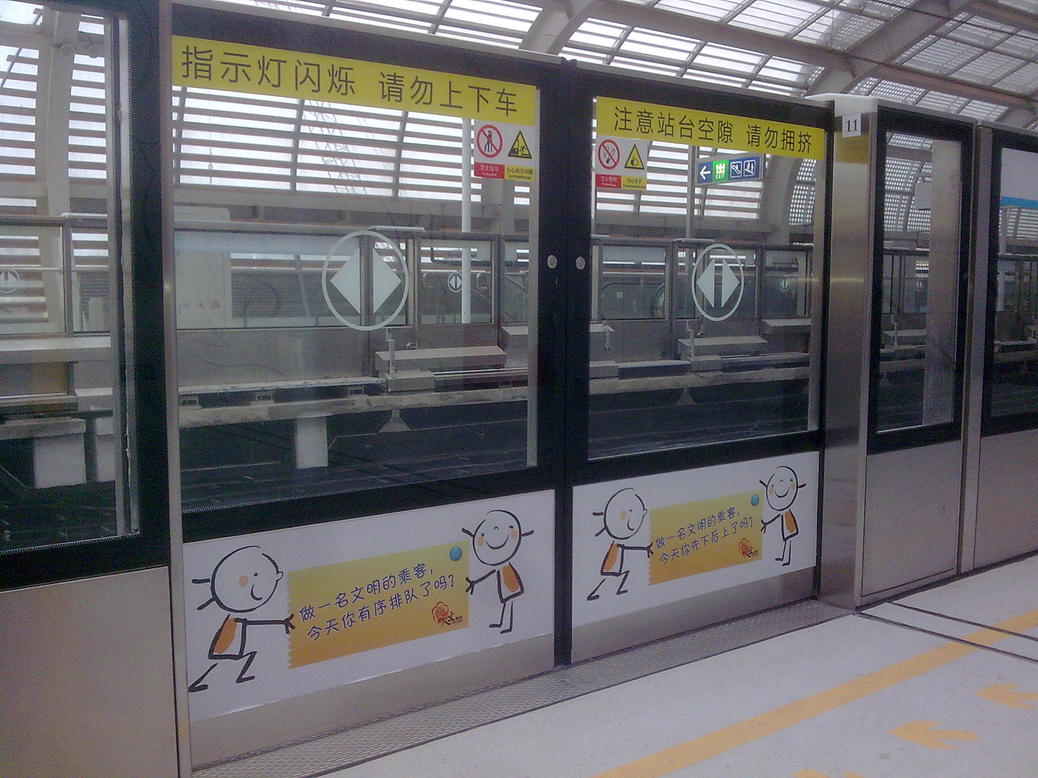 南京地铁1号线南延段屏蔽门（小龙湾站）